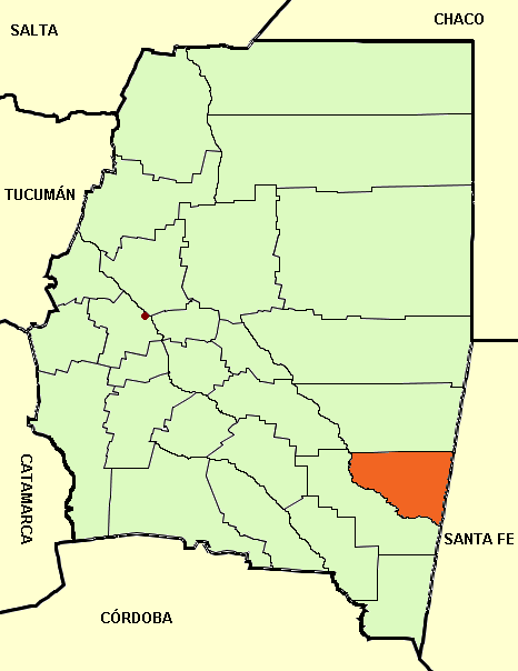 Mapa editado de: Santiago del Estero province (Argentina), departments and capital.png